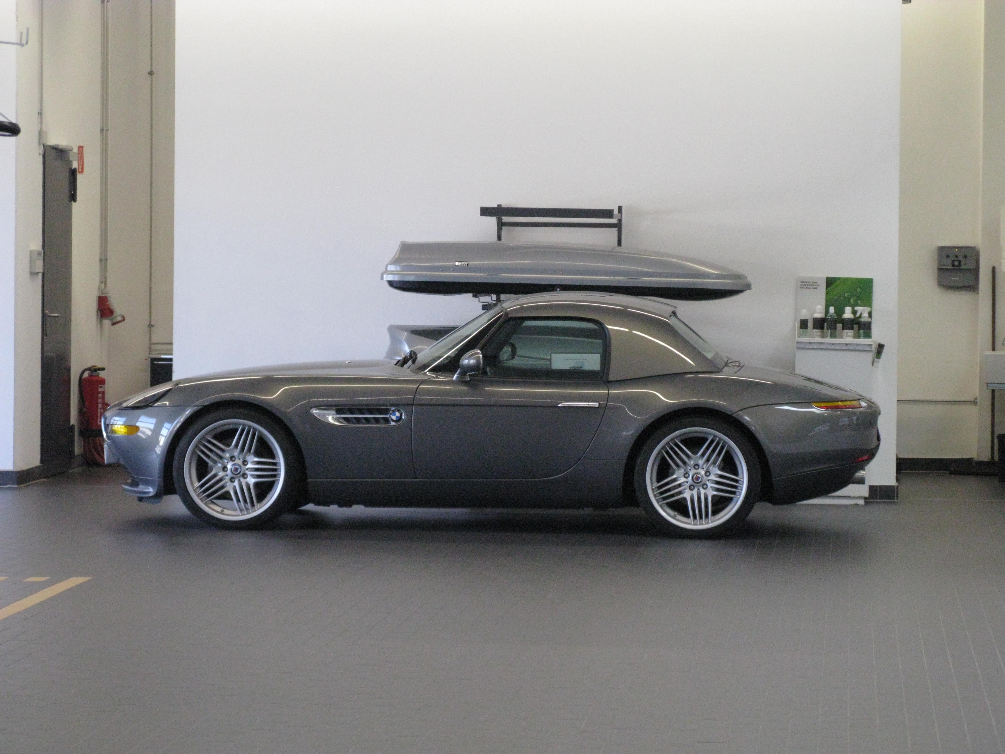 BMW Niederlassung Hamburg